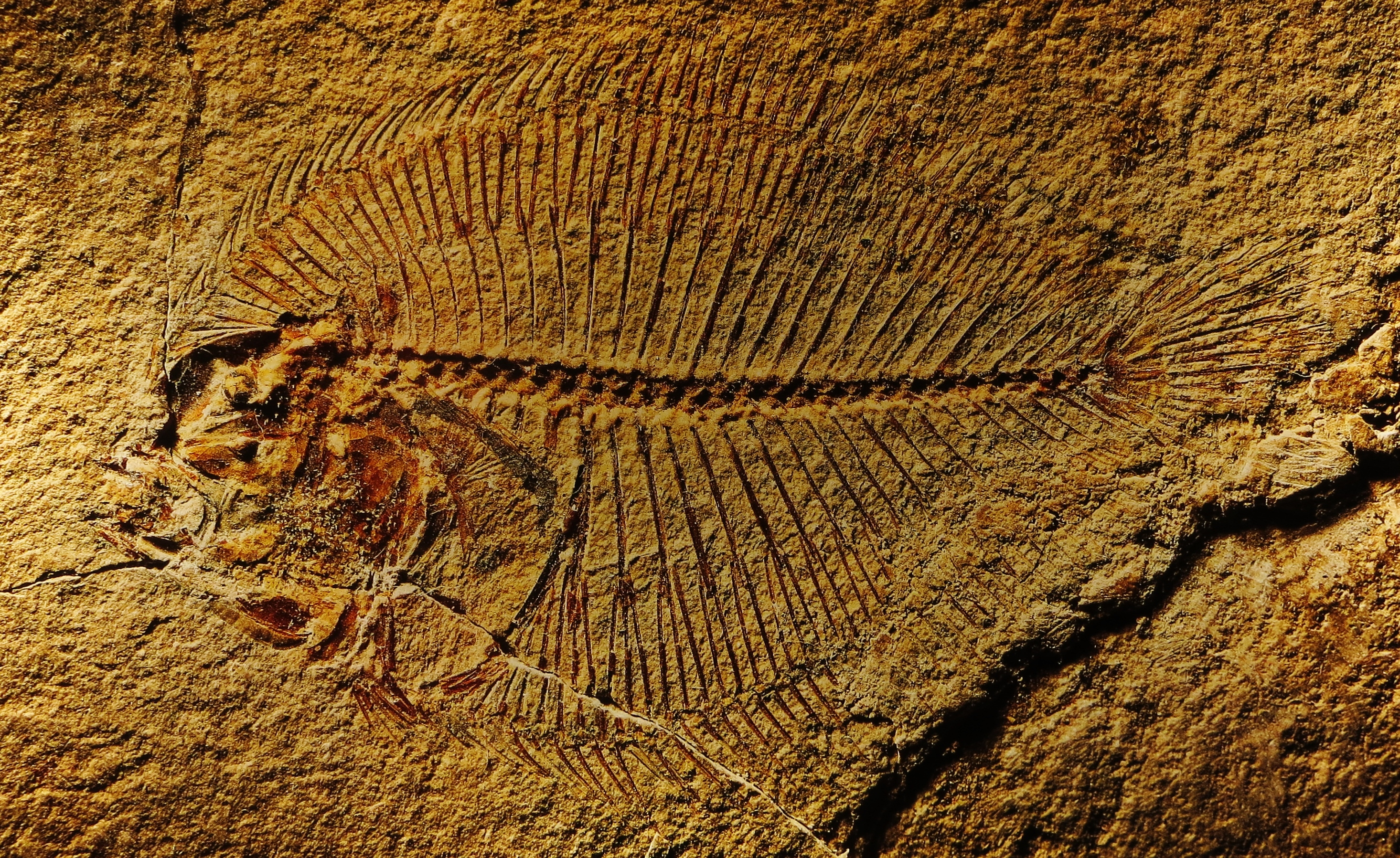 Fossil of Eobothus- Museo dei Fossili di Bolca